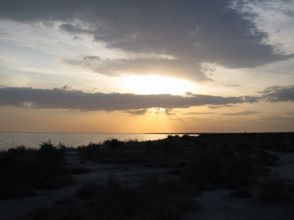 озеро Сарыкамыш, Узбекистан. Спасибо сайту